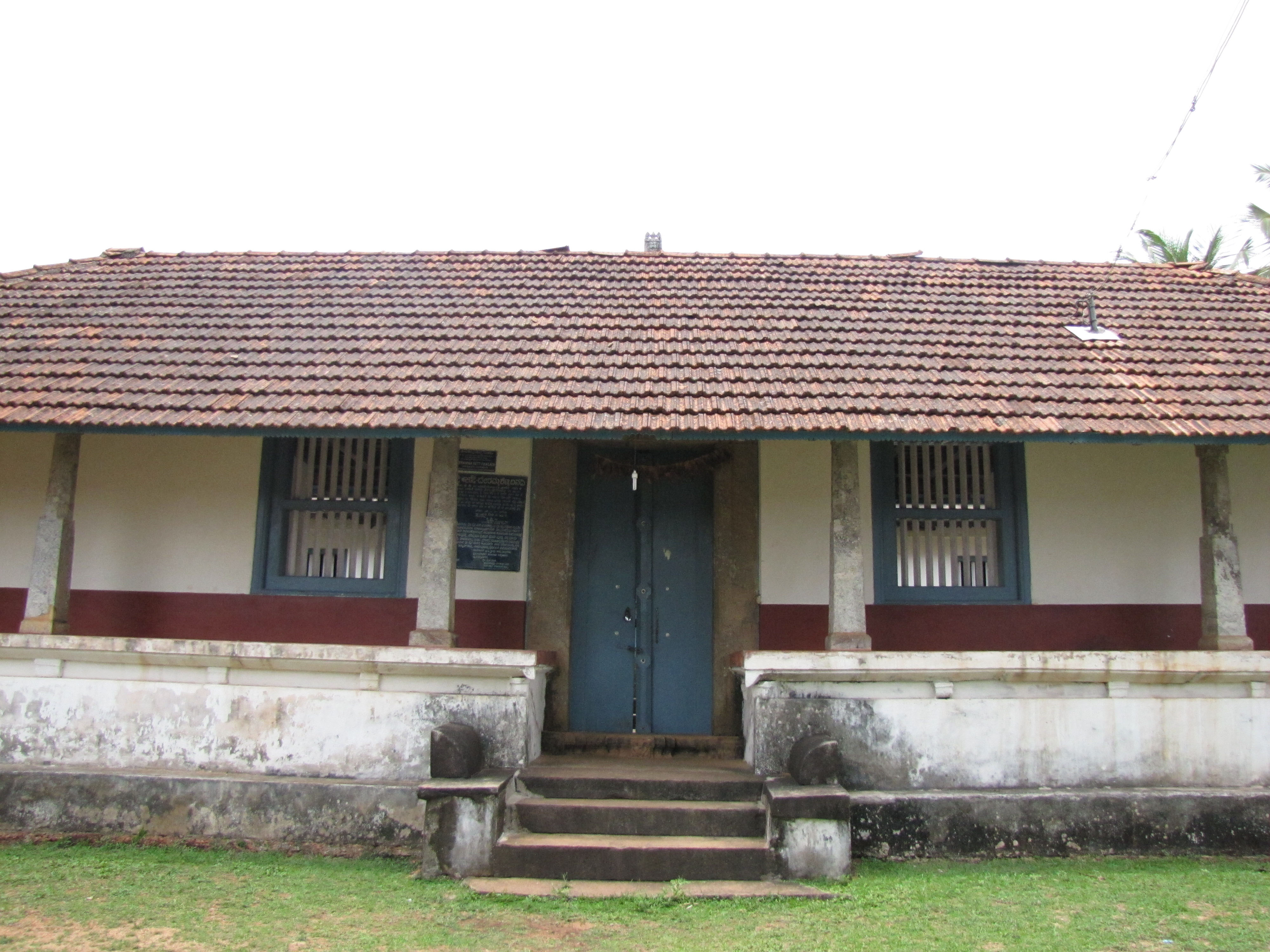 Deremma Setty Basadi Moodbidri